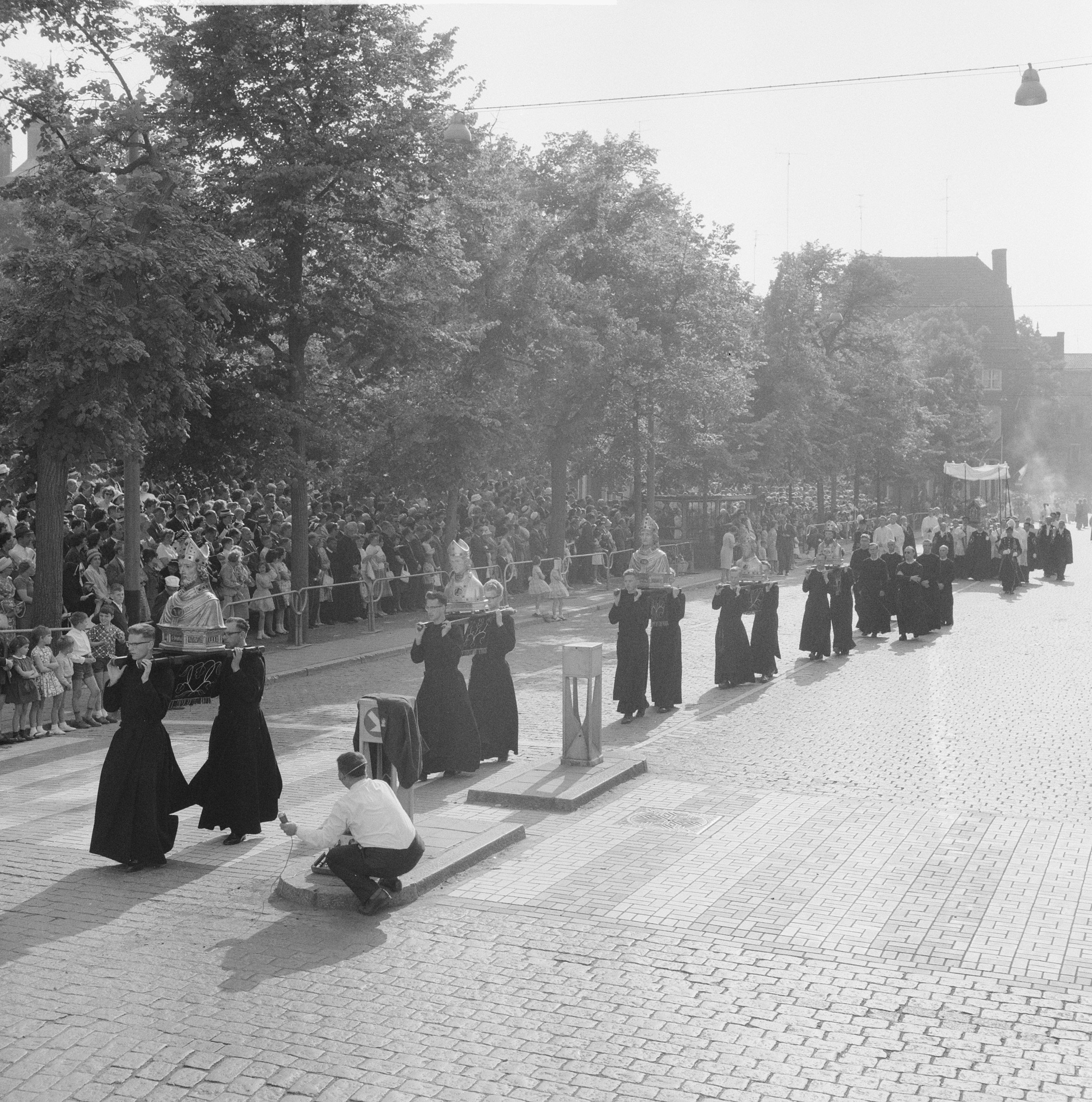 Collectie / Archief : Fotocollectie Anefo Reportage / Serie : [ onbekend ] Beschrijving : Heiligdomsvaart in Maastricht. Procesie Datum : 8 juli 1962 Locatie : Maastricht Trefwoorden : bedevaarten, processies, religies, rooms-katholieken Persoonsnaam : Heiligdomsvaart, Servaas Fotograaf : Koch, Eric / Anefo Auteursrechthebbende : Nationaal Archief Materiaalsoort : Negatief (zwart/wit) Nummer archiefinventaris : bekijk toegang 2.24.01.03 Bestanddeelnummer : 914-1109